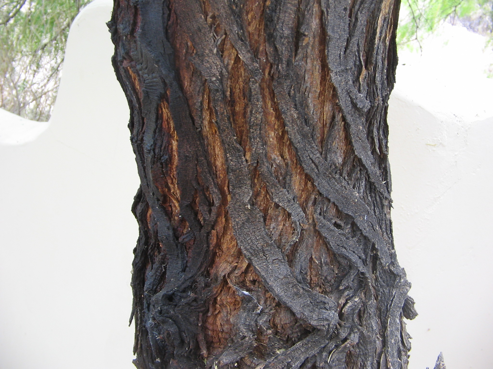 Prosopis glandulosa bark